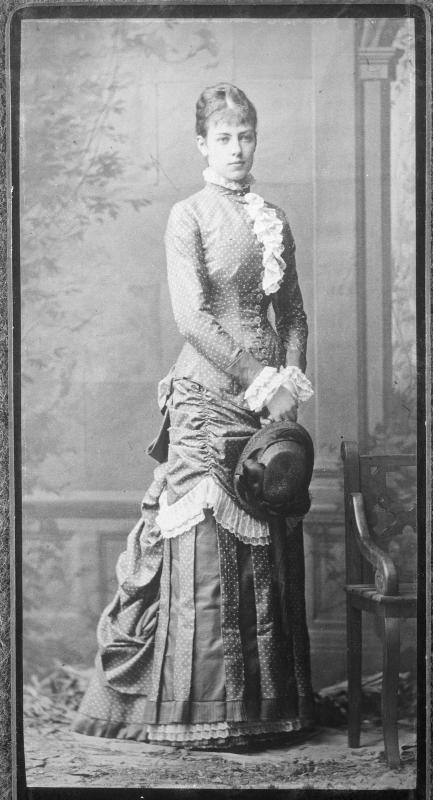 Freiin Marie Wallersee